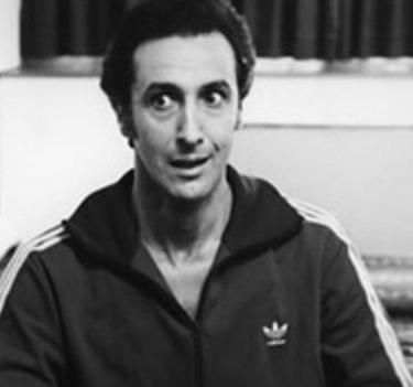 Julio López en la película Hay que parar la delantera (1977).